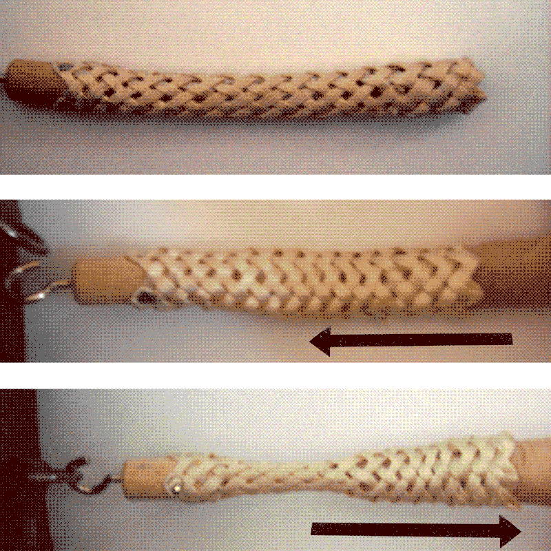 Mädchenfänger in Funktion